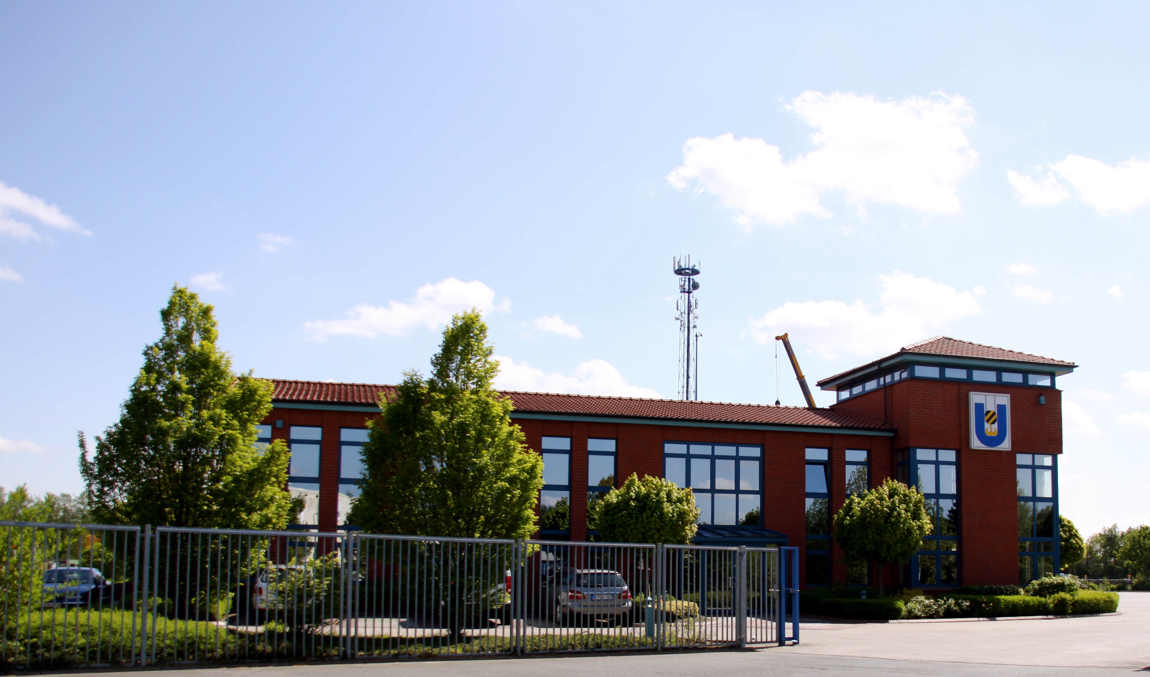 Ulferts Krane im Gewerbegebiet Neermoor